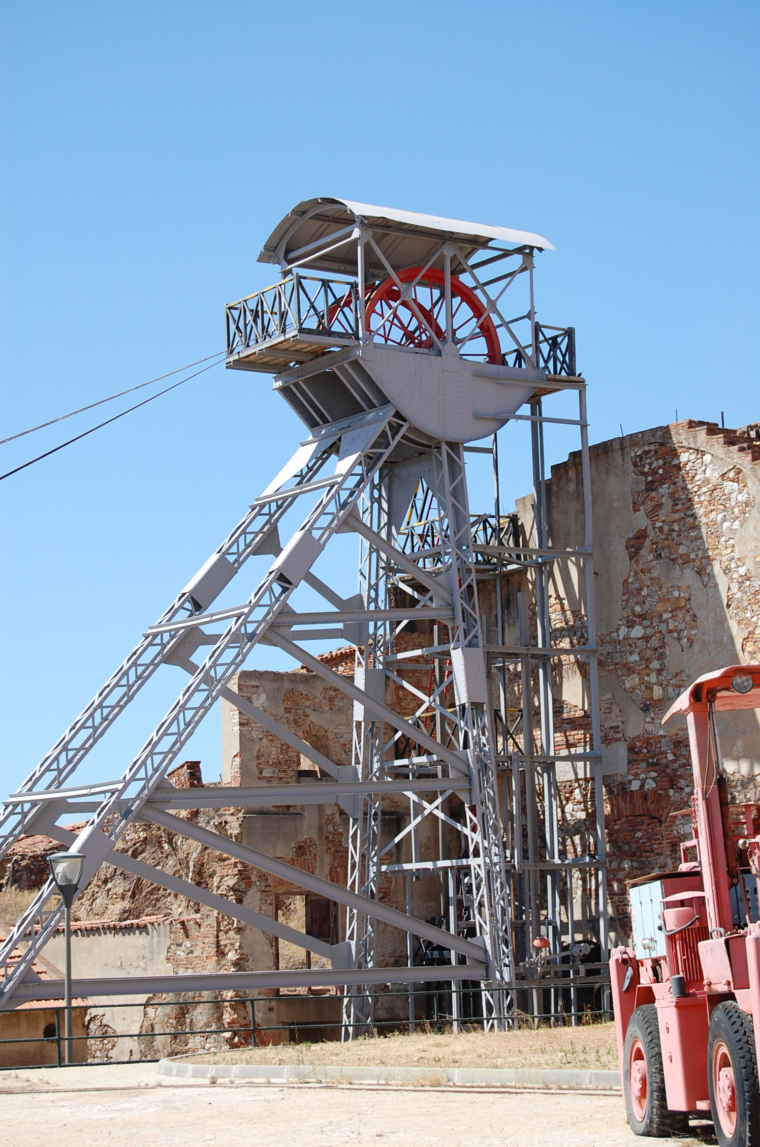 Castillete de las Minas de Almadén (provincia de Ciudad Real - España).